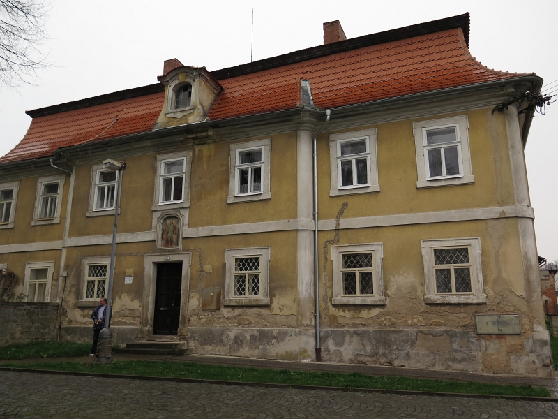 Fara, T. G. Masaryka 1, Libáň.